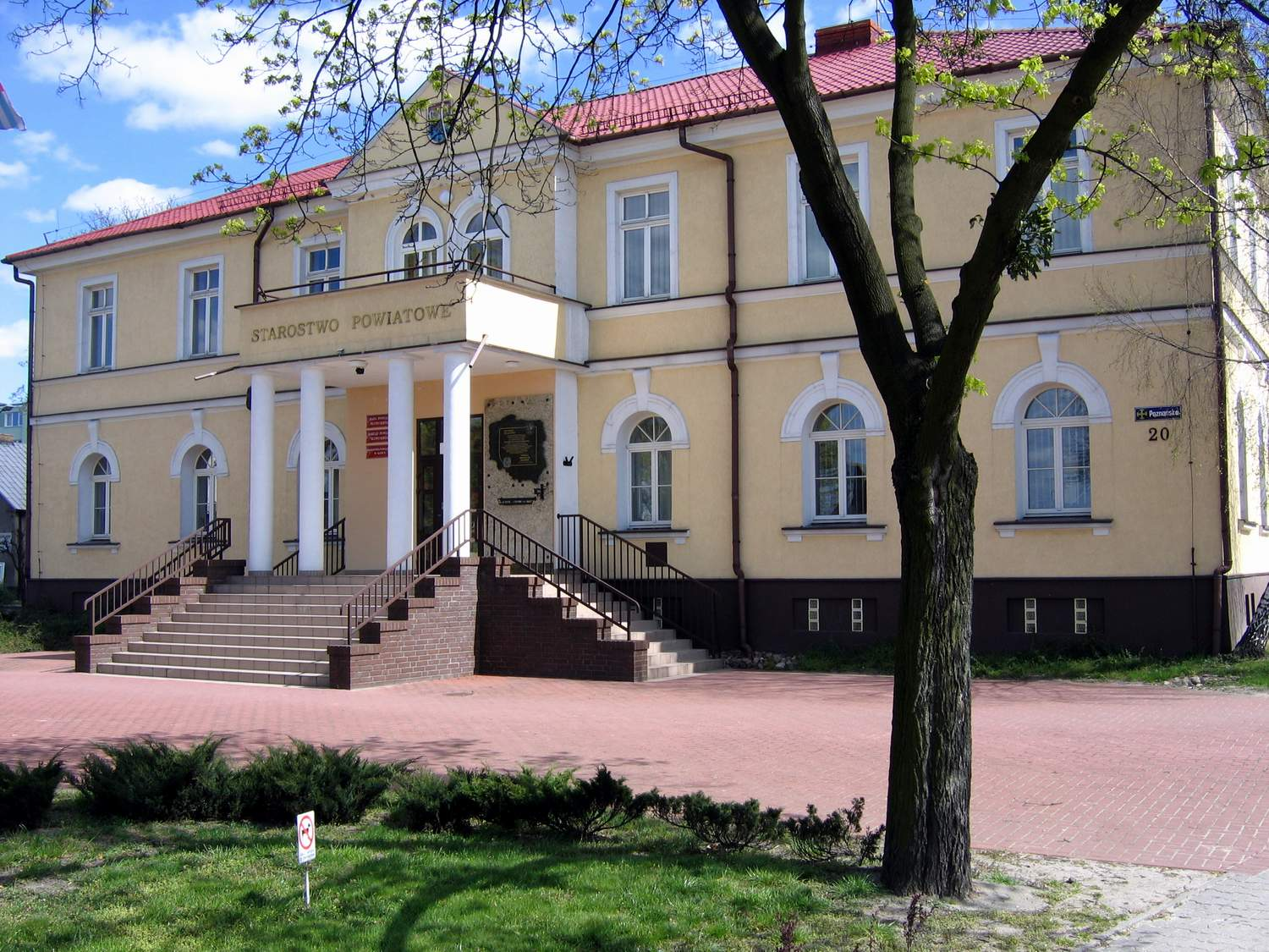 Budynek Starostwa Powiatowego w Słupcy, dawniej budynek sądu, widok od ulicy Poznańskiej. (foto.Marcin Majdecki)